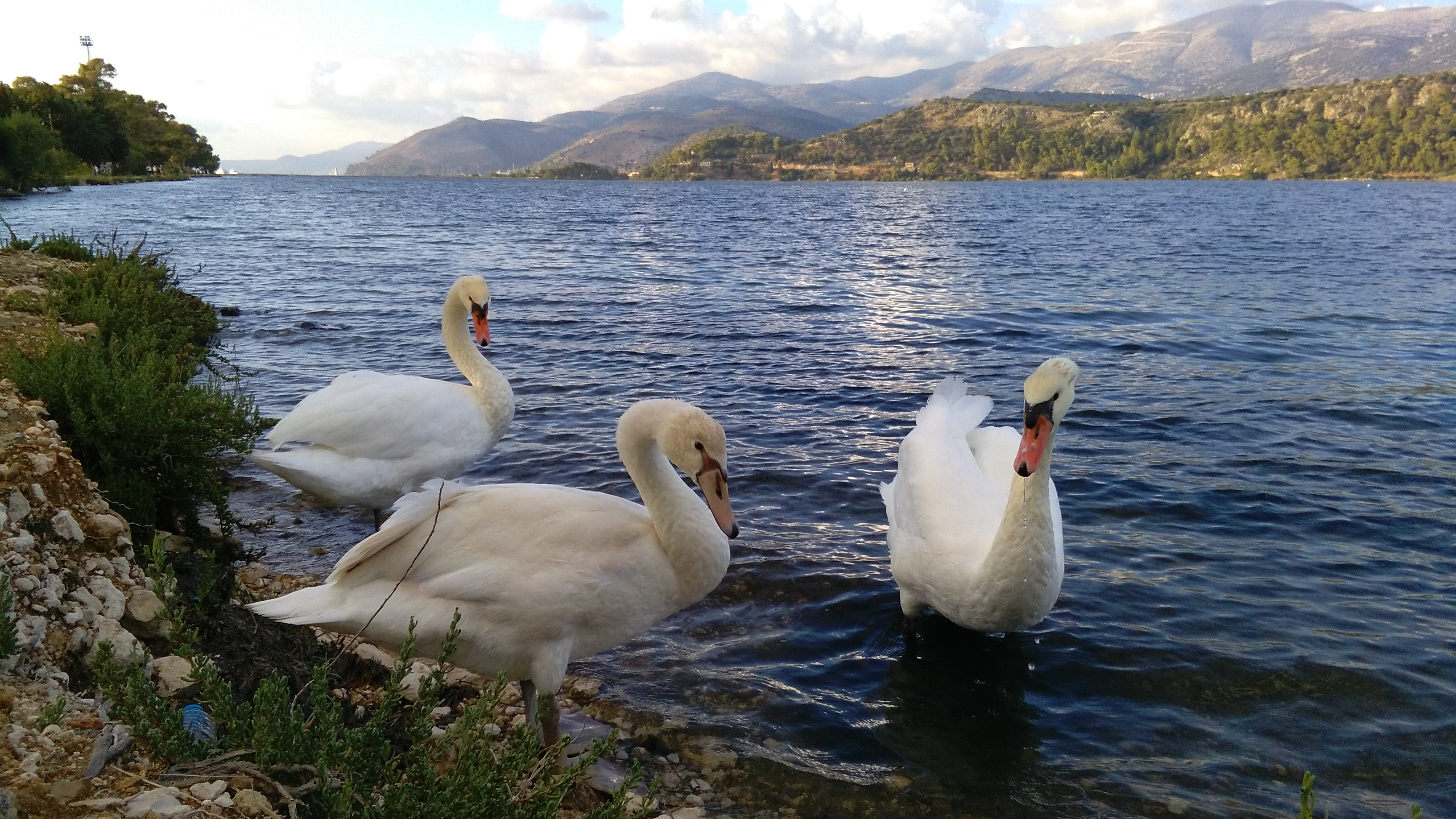 Κύκνοι στη λιμνοθάλασσα του Κουτάβου This is a photography of Natura 2000 protected area with ID GR2220002